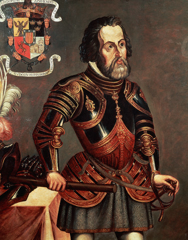 Anónimo, Hernán Cortés, s. XVI, óleo/tela, detalle. Col. Patronato Hospital de Jesús. Foto Pedro Cuevas. AF IIE-UNAM.